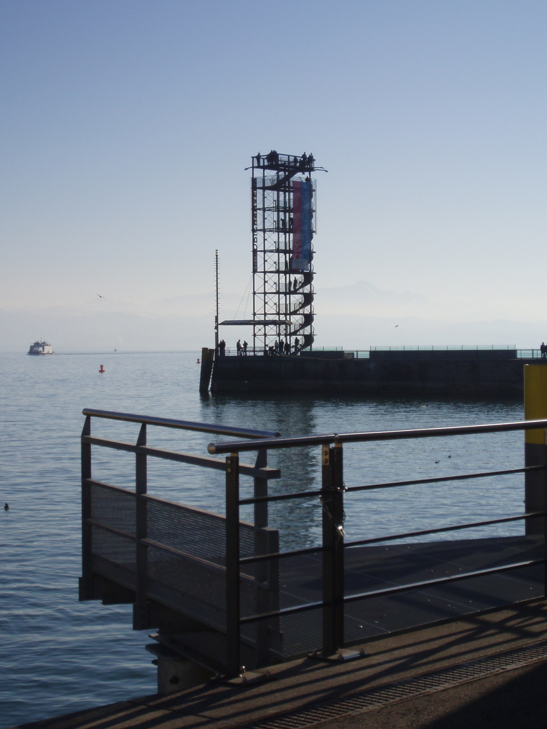 Aussichtsturm am Friedrichshafener Hafen